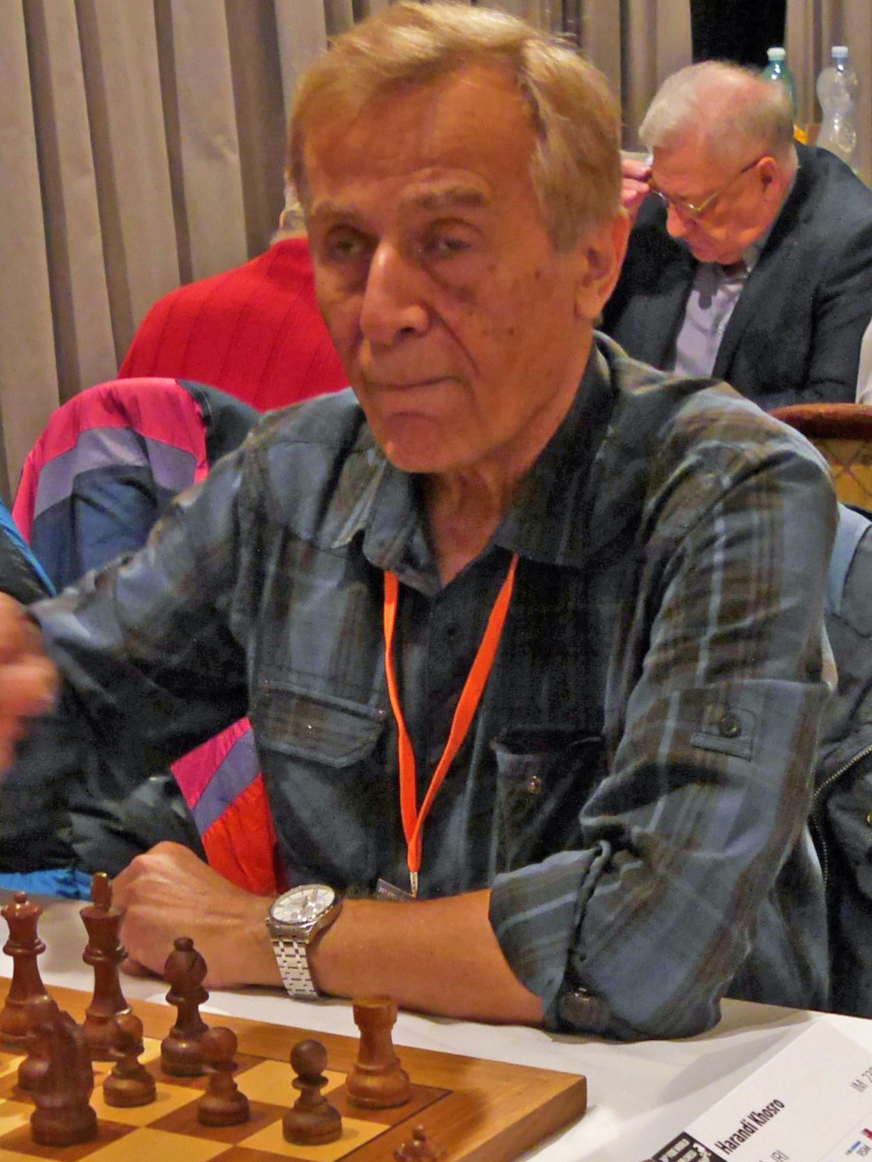 Khosro Harandi, Schachweltmeisterschaft der Senioren 2016 in Marienbad.